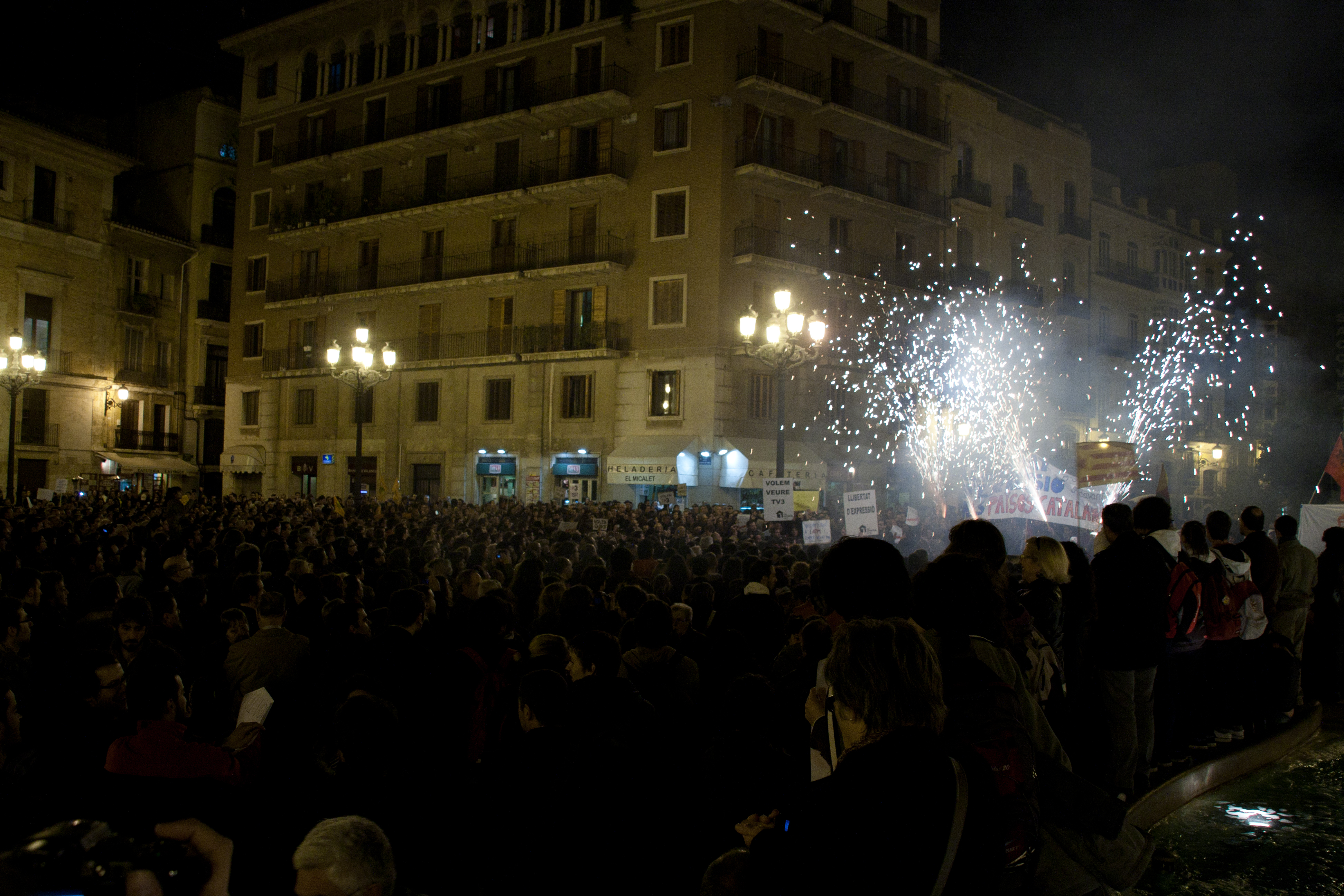 Milers de persones ens reunírem en favor de les emissions de TVC al País Valencià i per donar suport a ACPV front a les sancions de la Generalitat Valenciana. --- Concentració del dilluns 21 de Febrer de 2011 a favor de les emissions de TVC al País Valencià i en contra de les sancions imposades per la Generalitat Valenciana a ACPV.